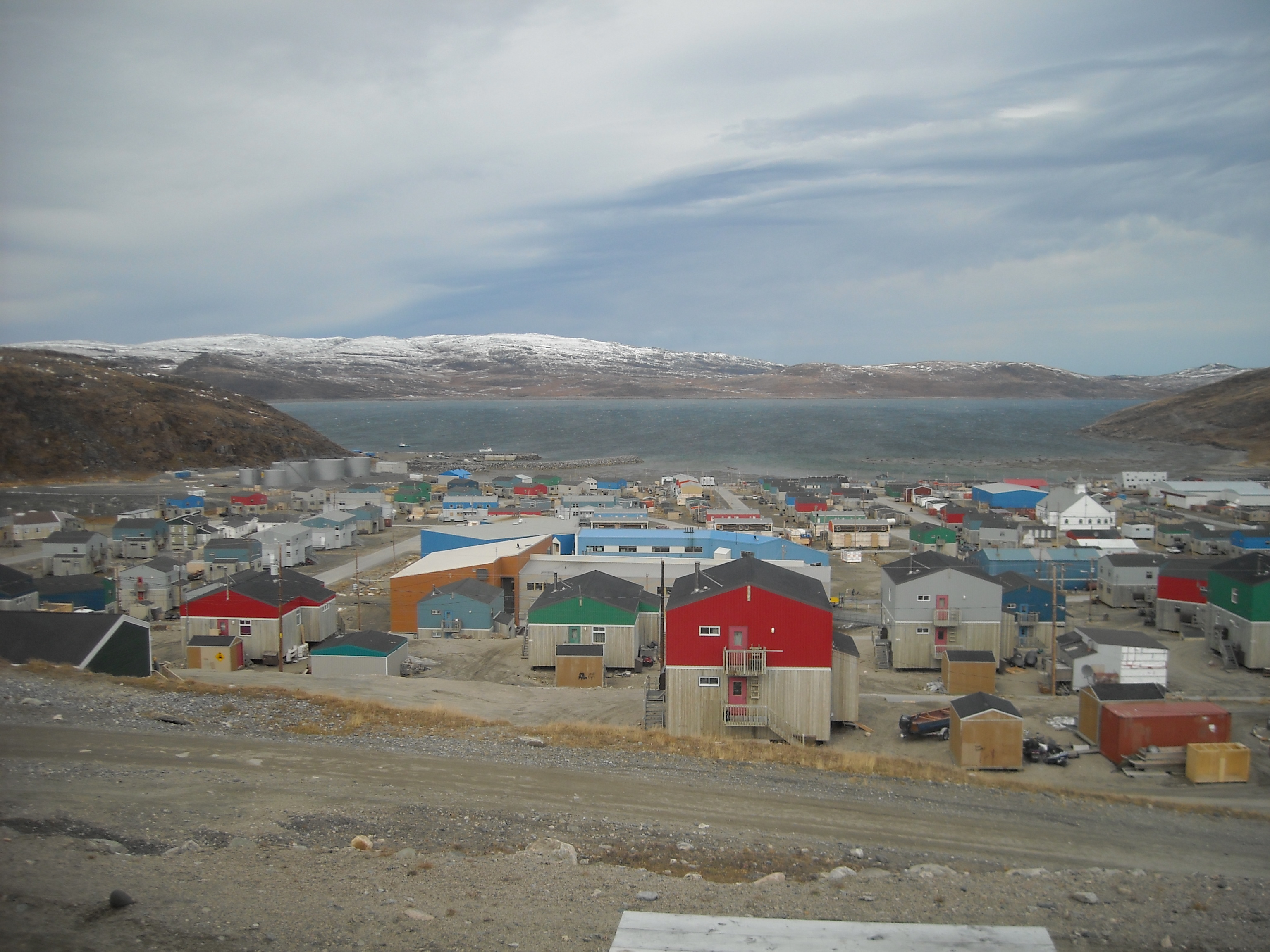 Village de Salluit en bordure du fjord Sugluk